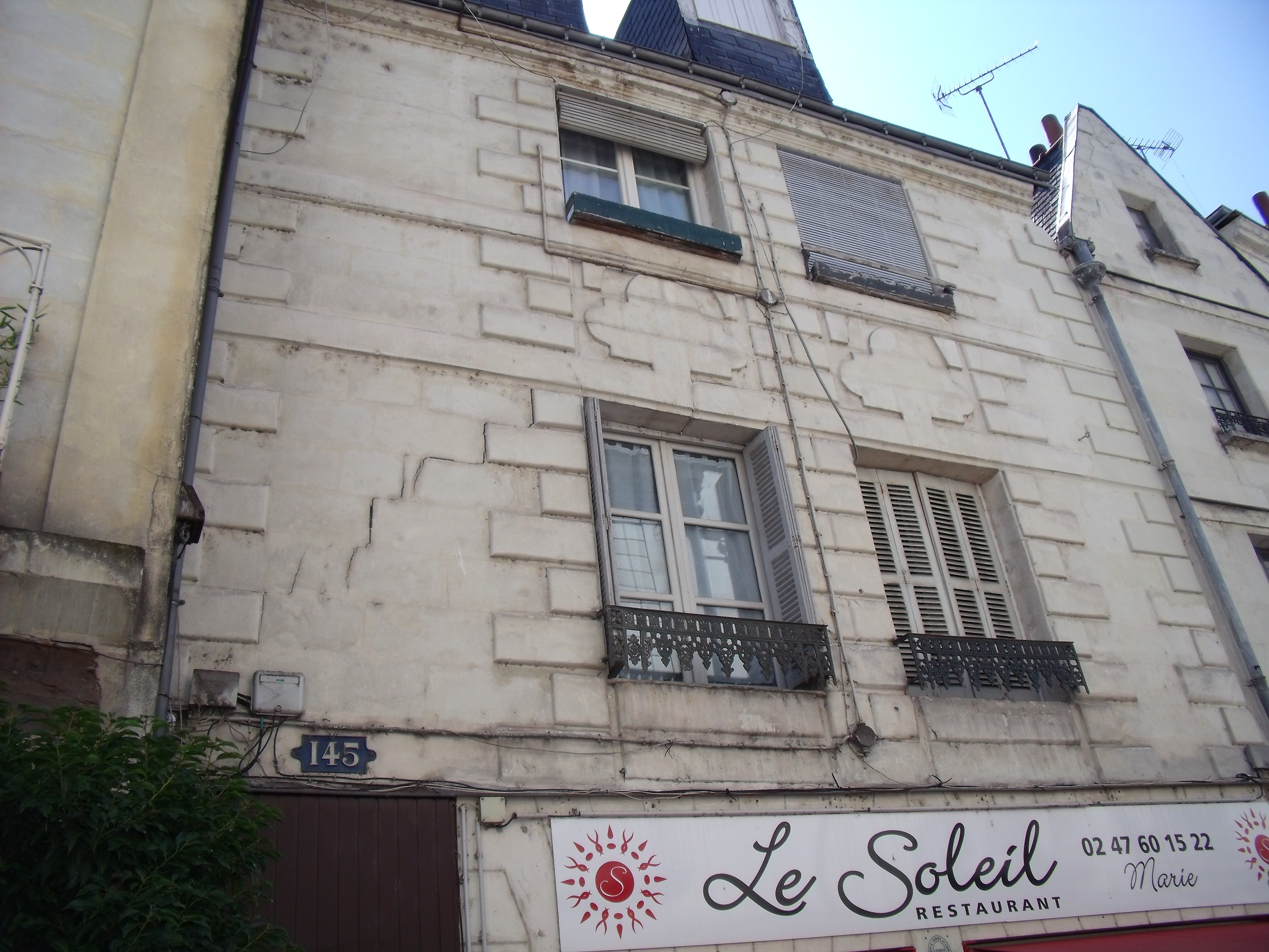 vieux tours, Rue Colbert n° 145, maison en pierre début XVIIe siècle